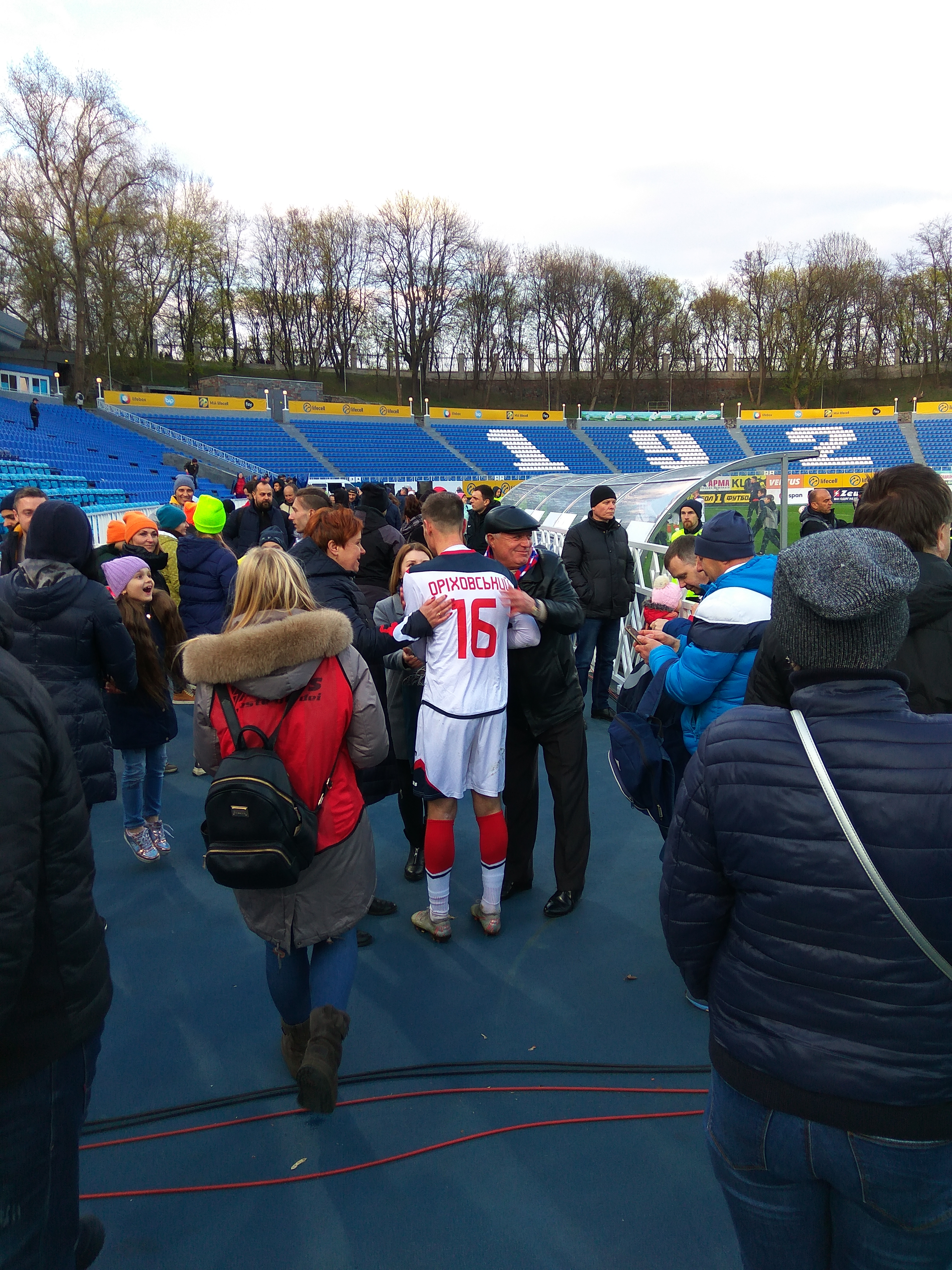 14.04.2019. Чемпіонат України з футболу. Арсенал (Київ) - Ворскла (Полтава) 1:0